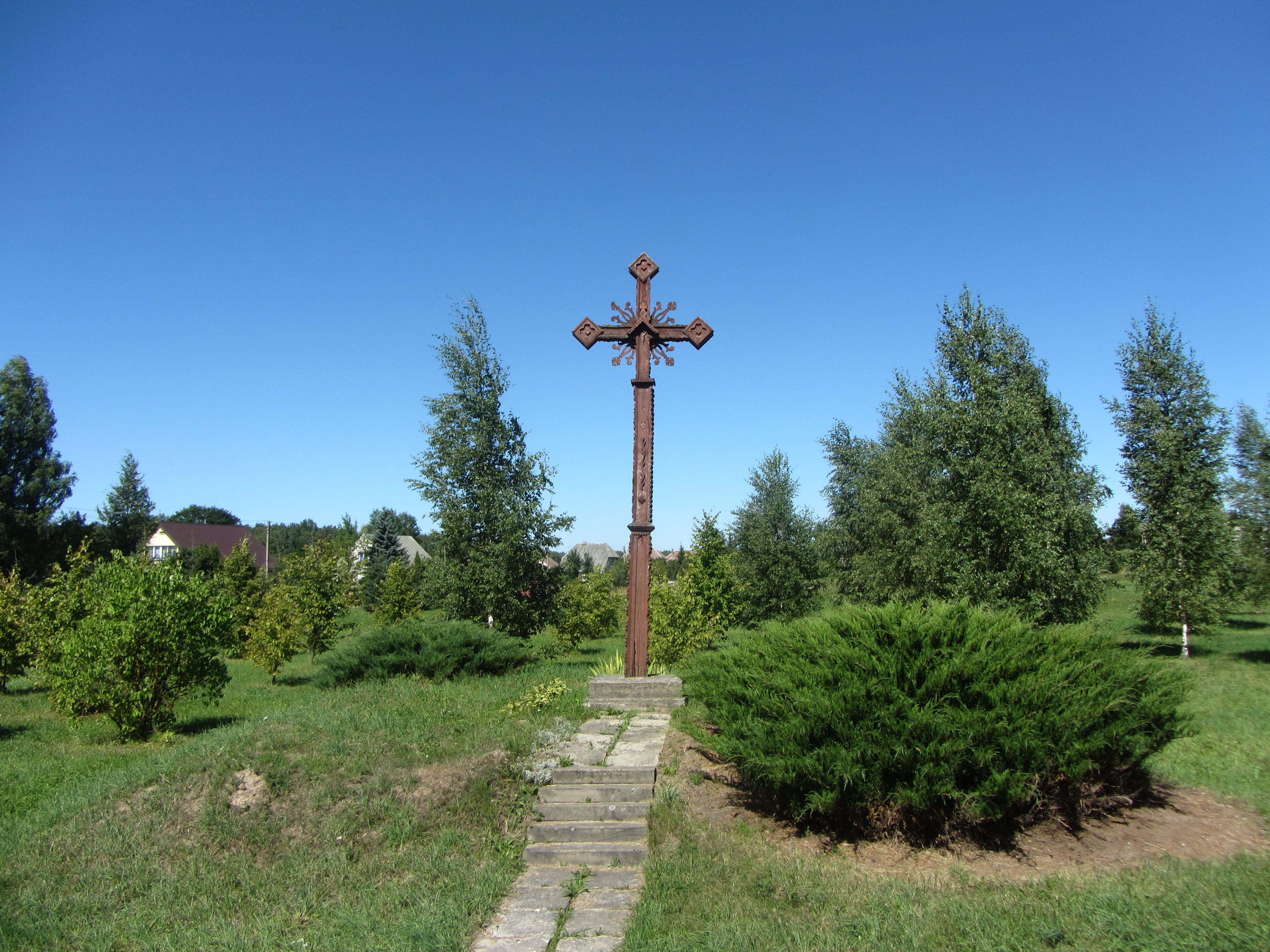 Naiviai, Lithuania